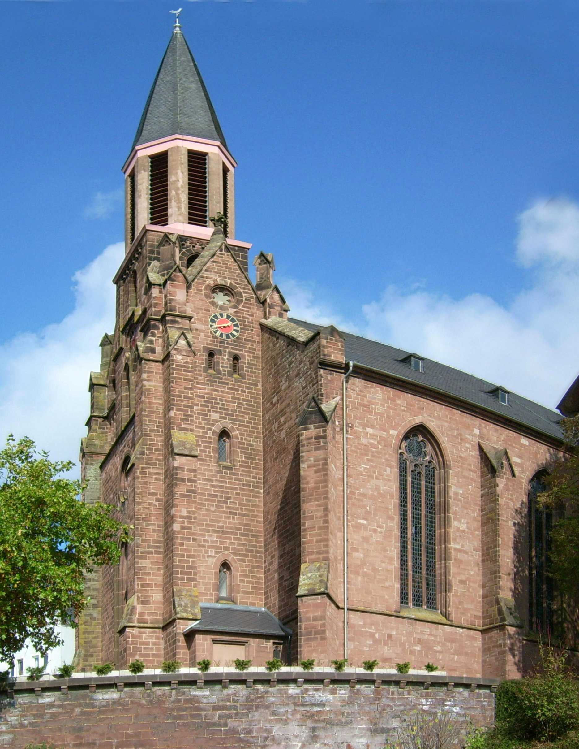 Kath. Kirche in Lebach